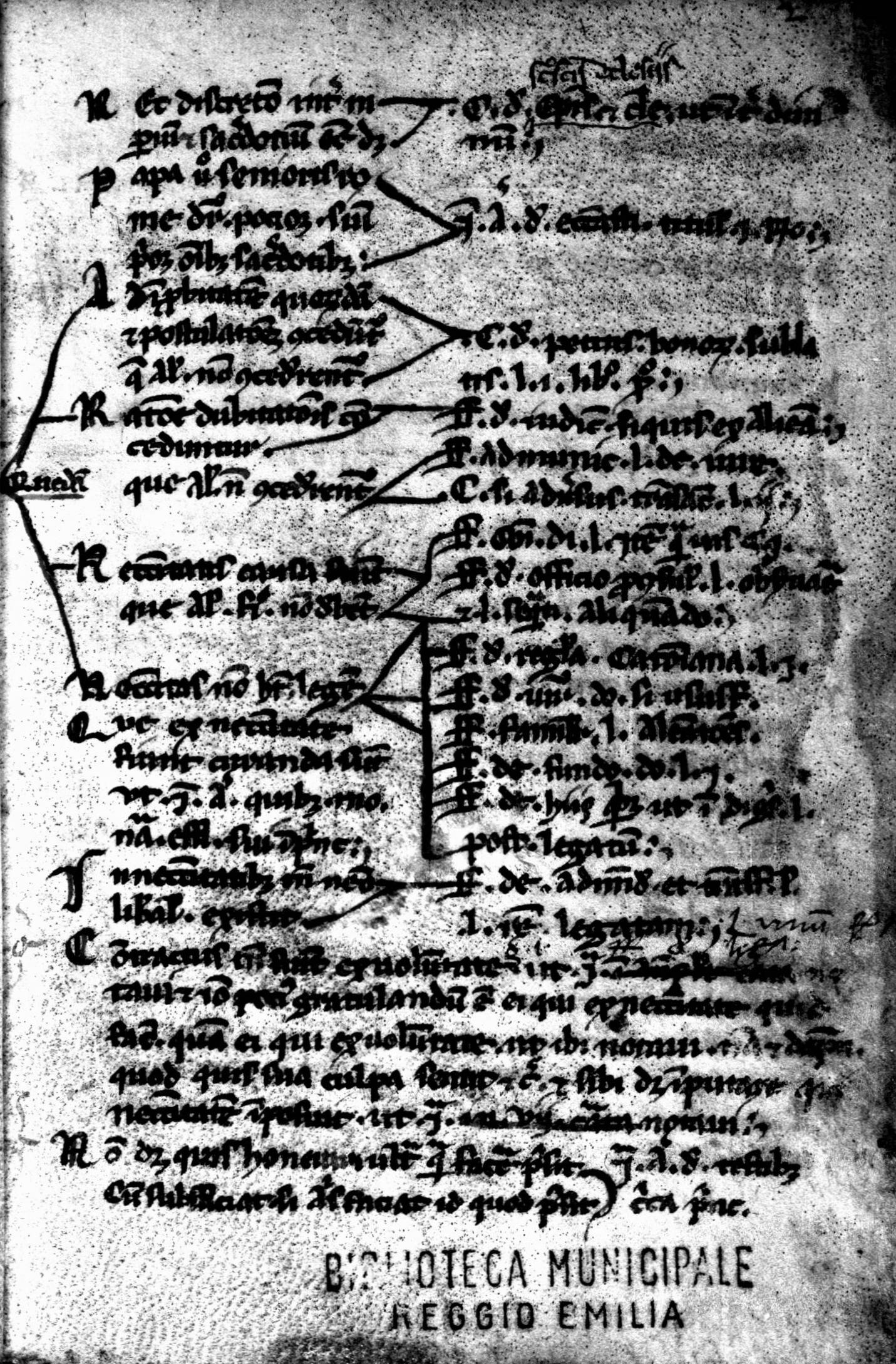 manuscript in lat. Reggio Emilia, Biblioteca Municipale A. Panizzi, Fondo manoscritti, Vari G. 55. - secolo 13. - ff. 78 : membranaceo ; 159 x 110 mm. ((Il catalogo online della biblioteca data il codice "1242-1251 ca.", mentre Dolezalek lo data "saec. XIV"